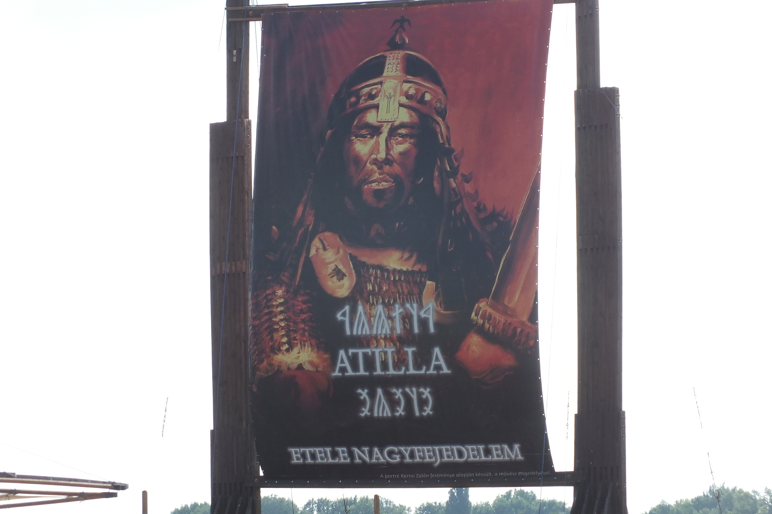 зображення великого князя Отілло над ареною, під час Курултаю в Угорщині 2018 рік